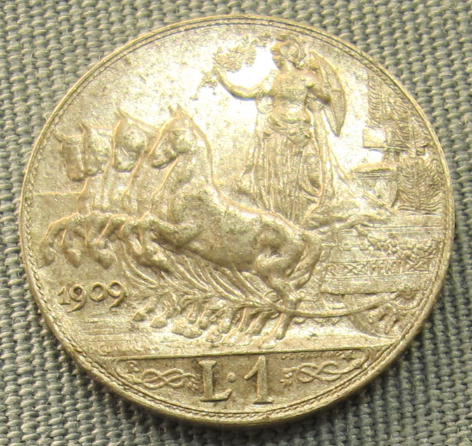 Italia, 1 lira di vittorio emanuele III, 1909